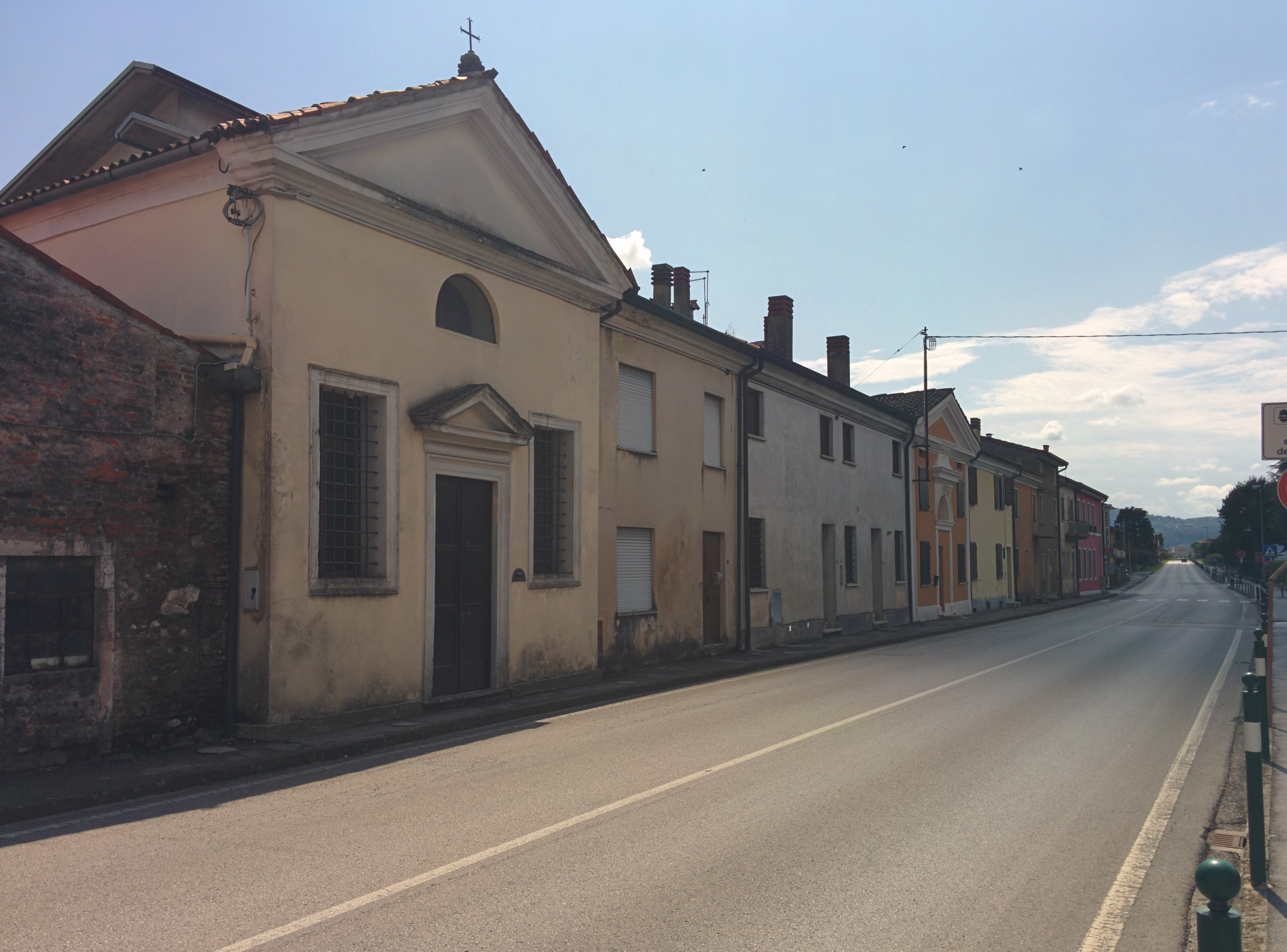 Ciò che rimane della Villa Ghellini-Piovene a Novoledo, lungo la Strada Provinciale 50